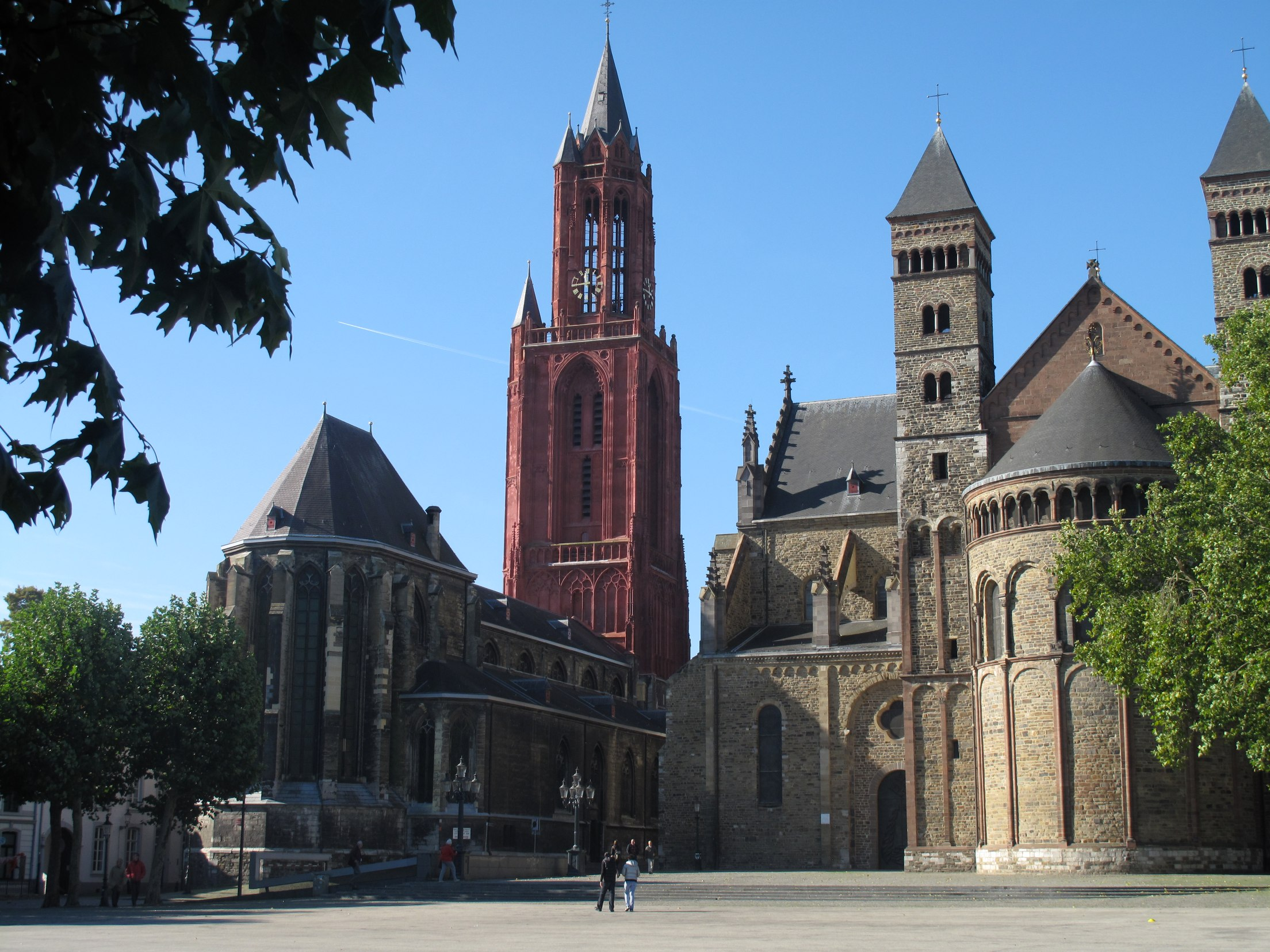 randonnée urbaine 11.10.10